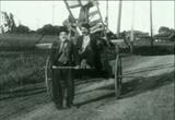 Escena de la película "Work" de Charles Chaplin